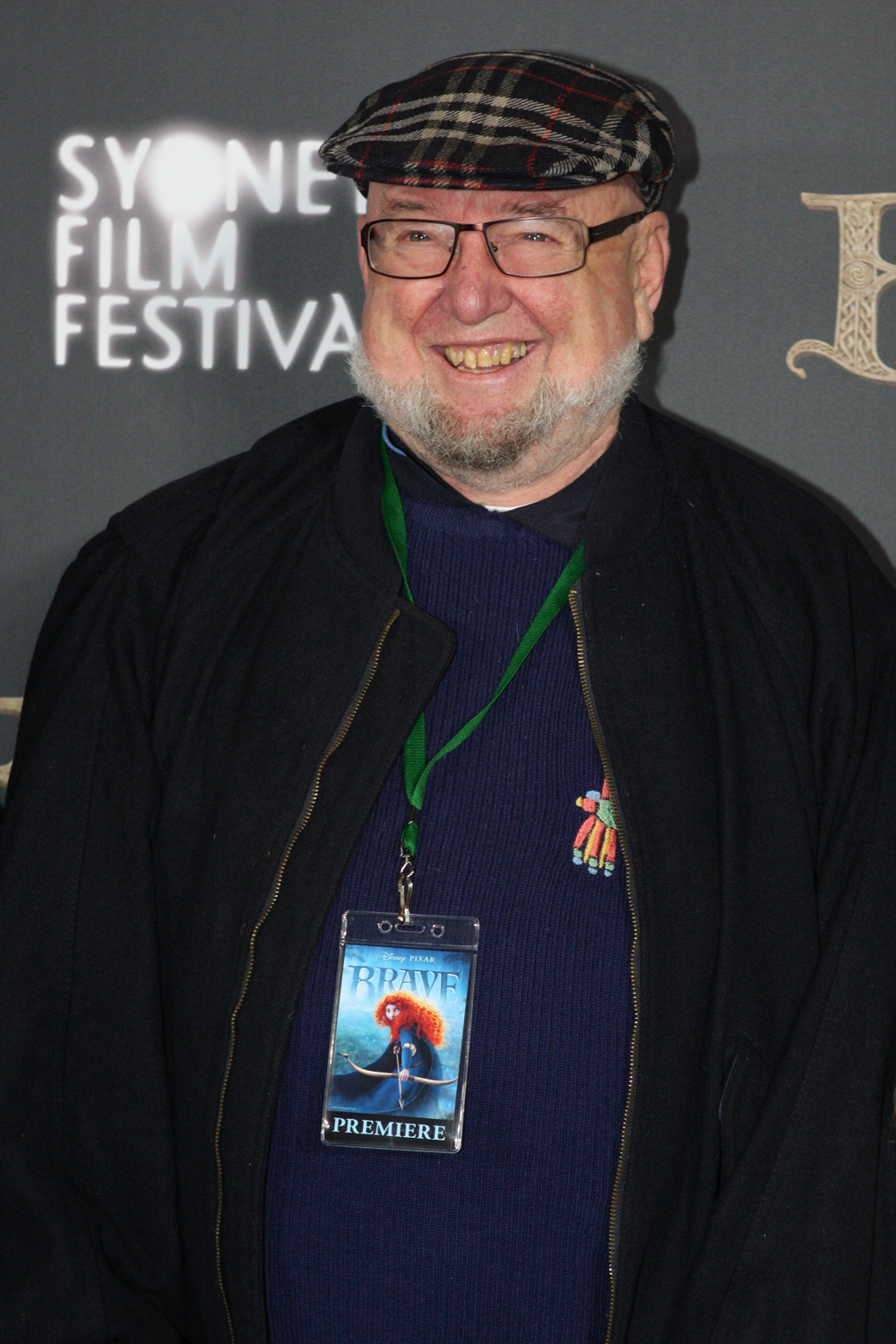 Billy Connolly durante la première de la película Brave en el Festival de Cine de Sidney